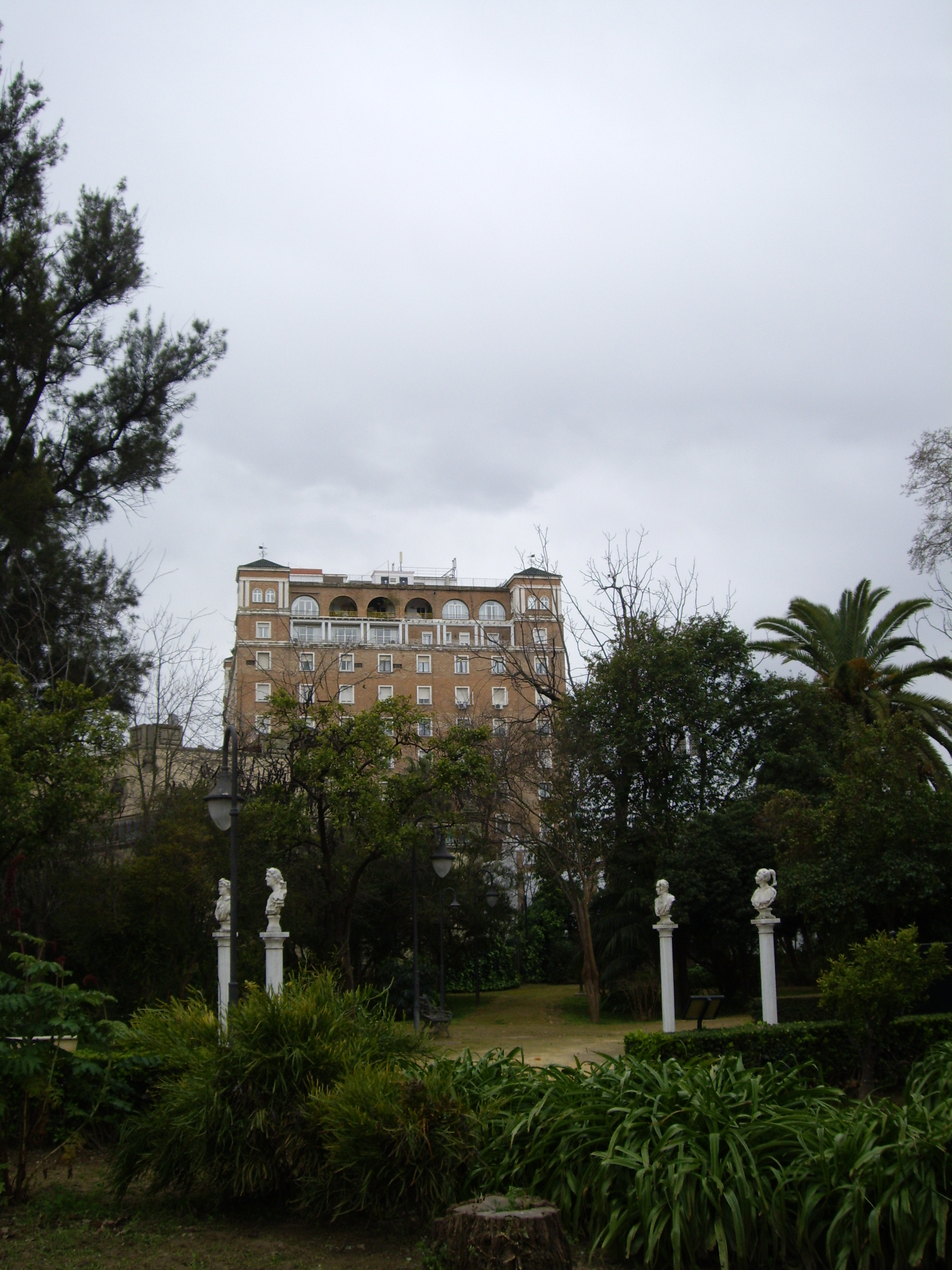 Edificio El Cano de Sevilla desde los Jardines de las Delicias